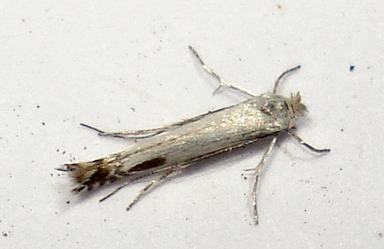 Lyonetia clerkella